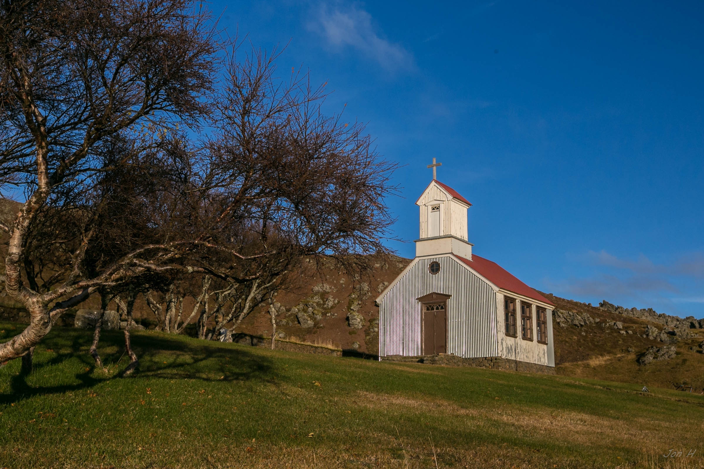 Rauðamelskirkja